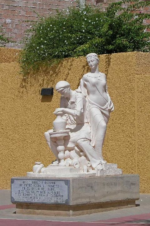 Escultura pública municipal en homenaje al alfarero en las calles de la localidad de Totana (Murcia, España).